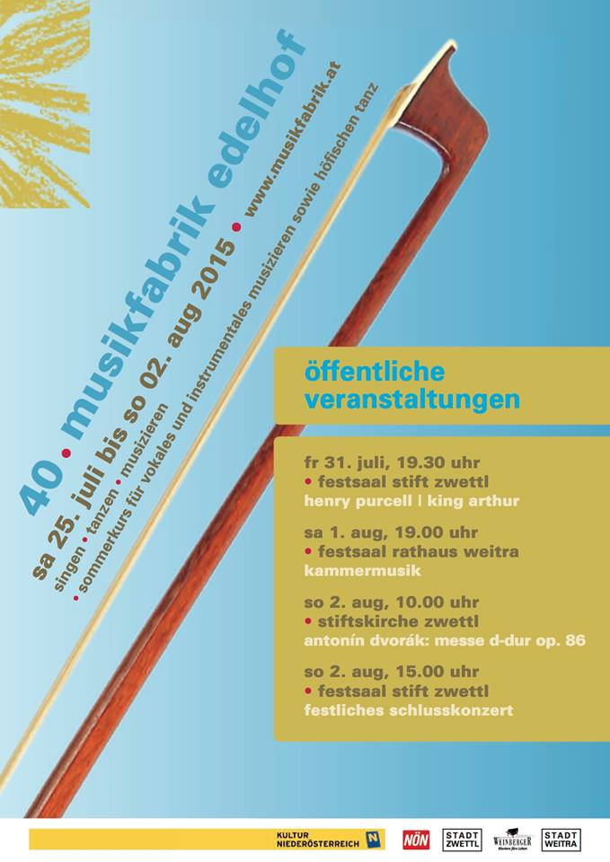 Kammermusikkurs MUSIKFABRIK EDELHOF